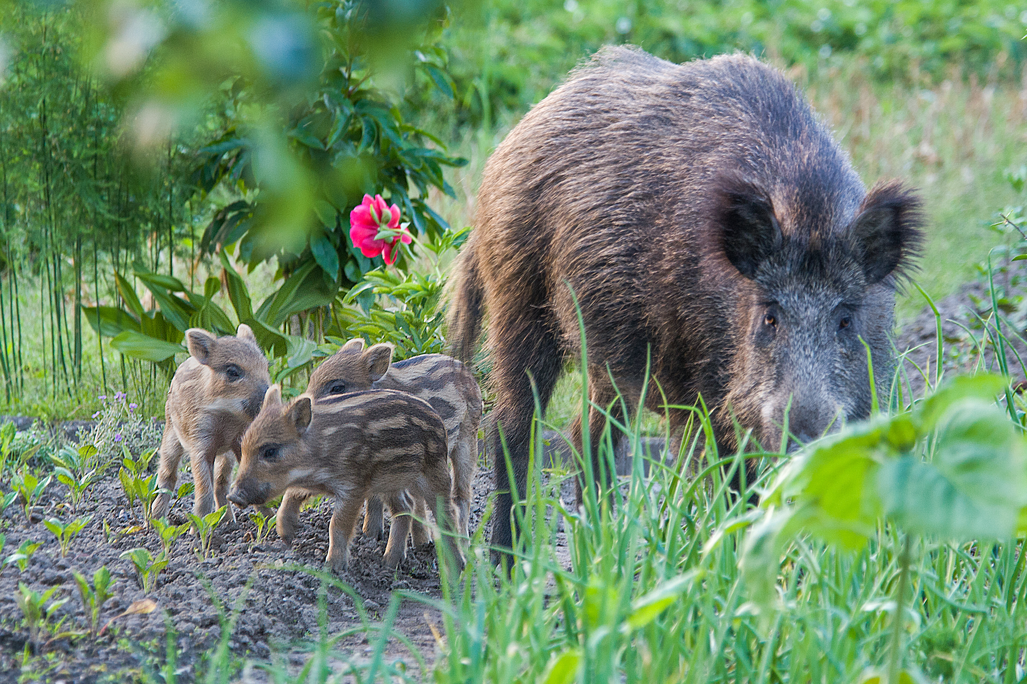 Dziki na obrzeżu Łodzi